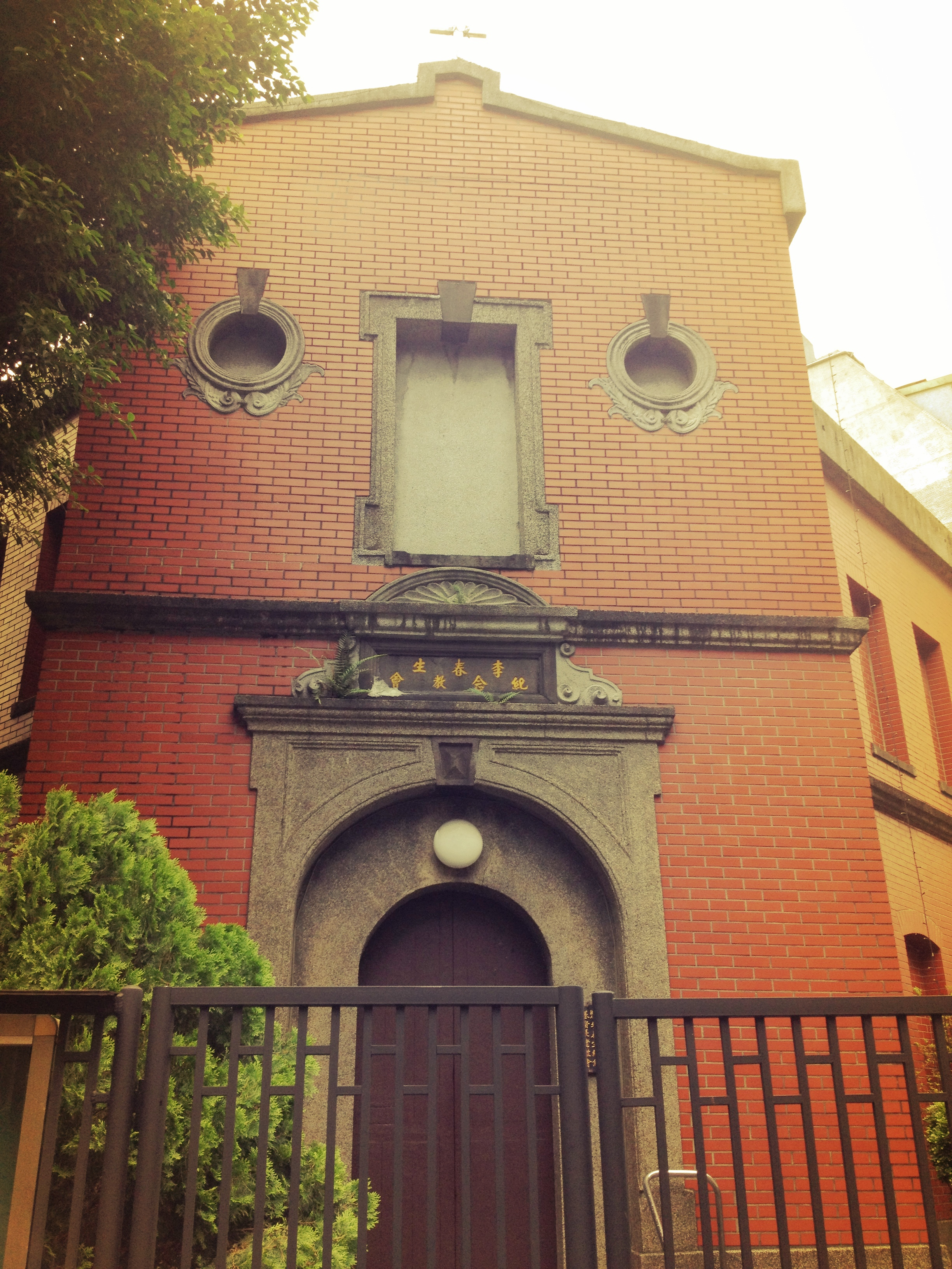 台灣基督長老教會李春生紀念教會。